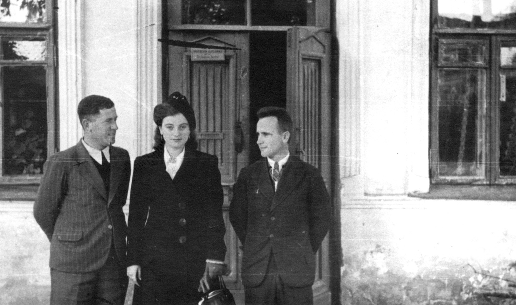 Бородай Харитон, Hariton Borodai